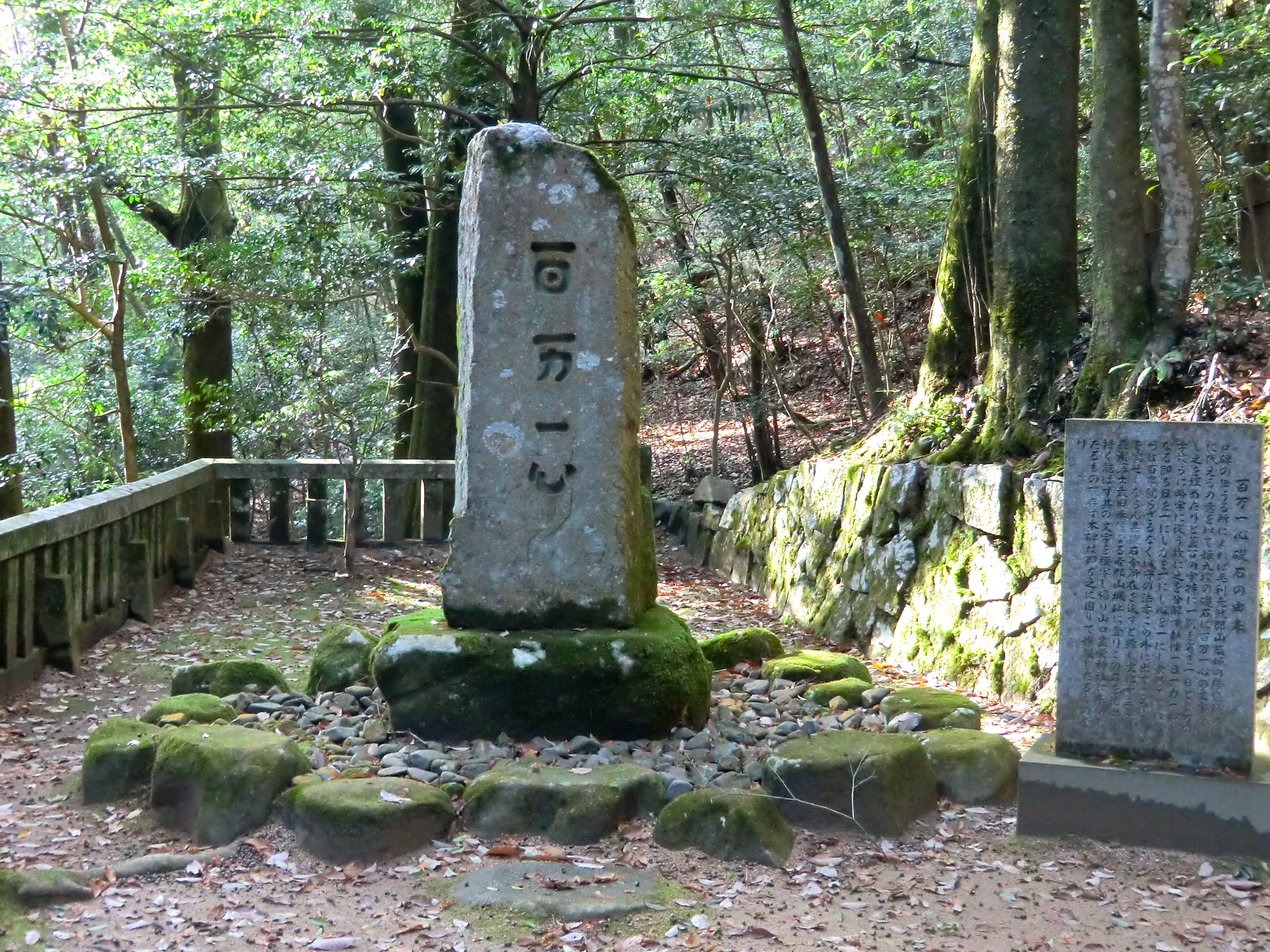 吉田郡山城跡の百万一心の碑（安芸高田市）